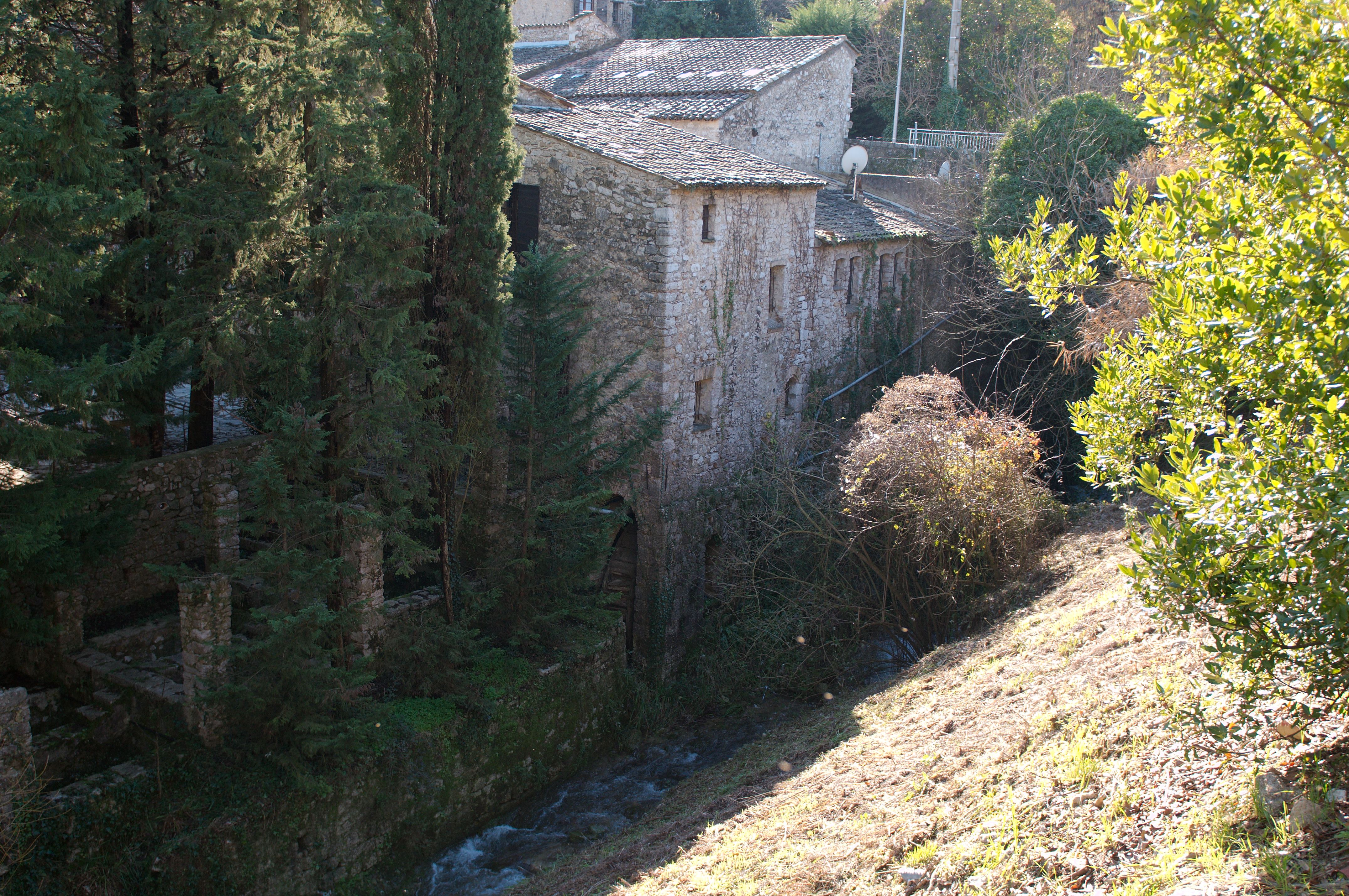 Ancien moulin à olives, à Vence près de la Lubiane un affluent de La Cagne